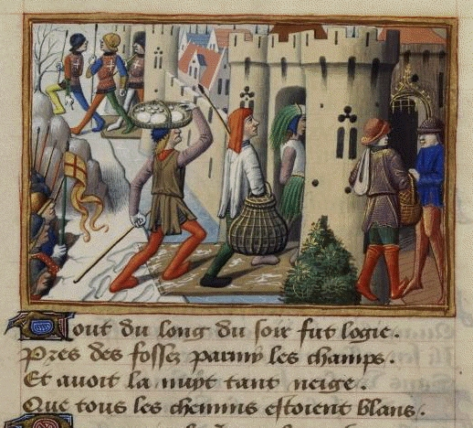 La prise de Pontoise par les Anglais, par Martial d'Auvergne, enluminure issue de l'ouvrage Vigiles de Charles VII, Paris, France, XV°siècle.